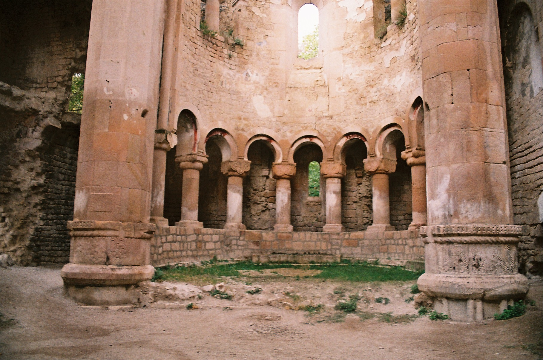 იშხანი. საკურთხეველი. (სერაფიტას პირადი არქივიდან. გადაღებულია 2008 წლის ოქტომბრის თვეში)